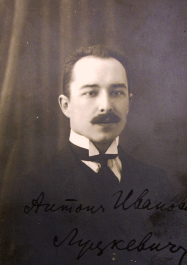 Антон Луцкевіч у часе вучобы ў Юр’еўскім універсітэце